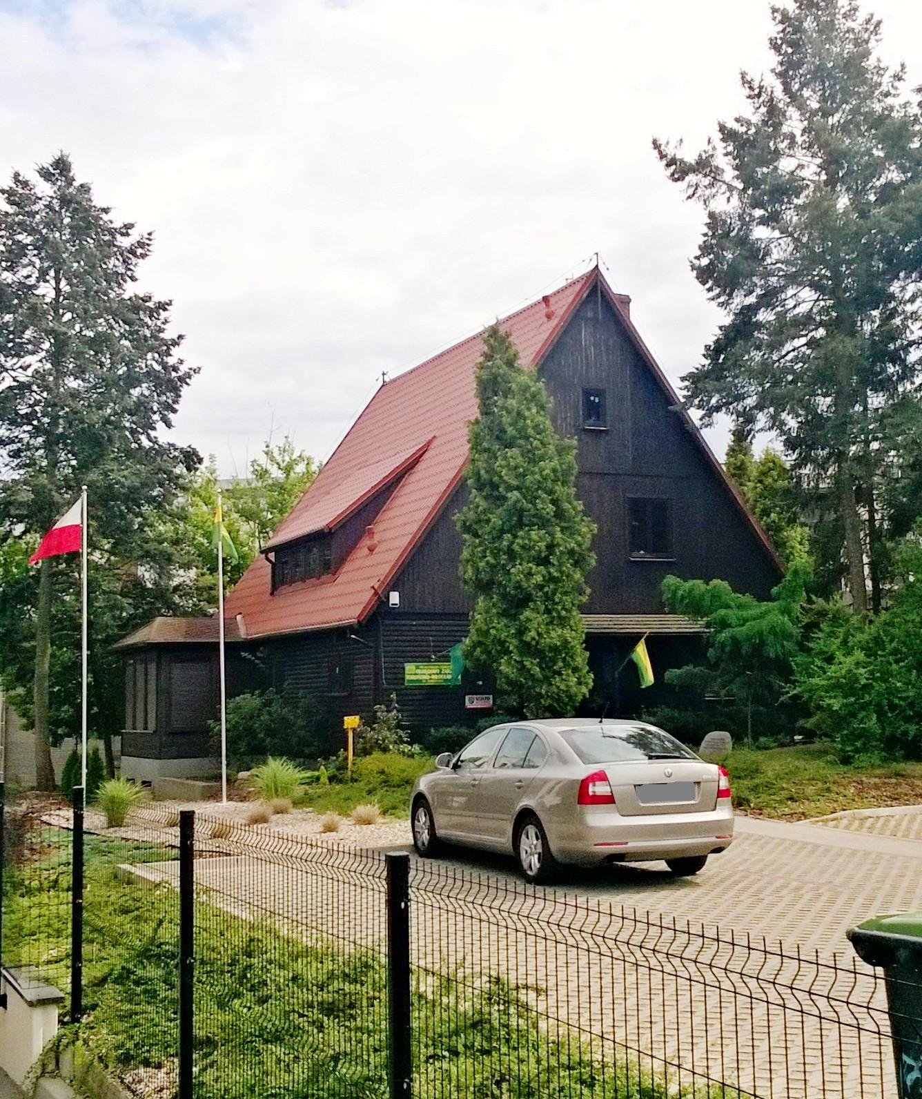 Budynek Polskiego Związku Działkowców w Toruniu